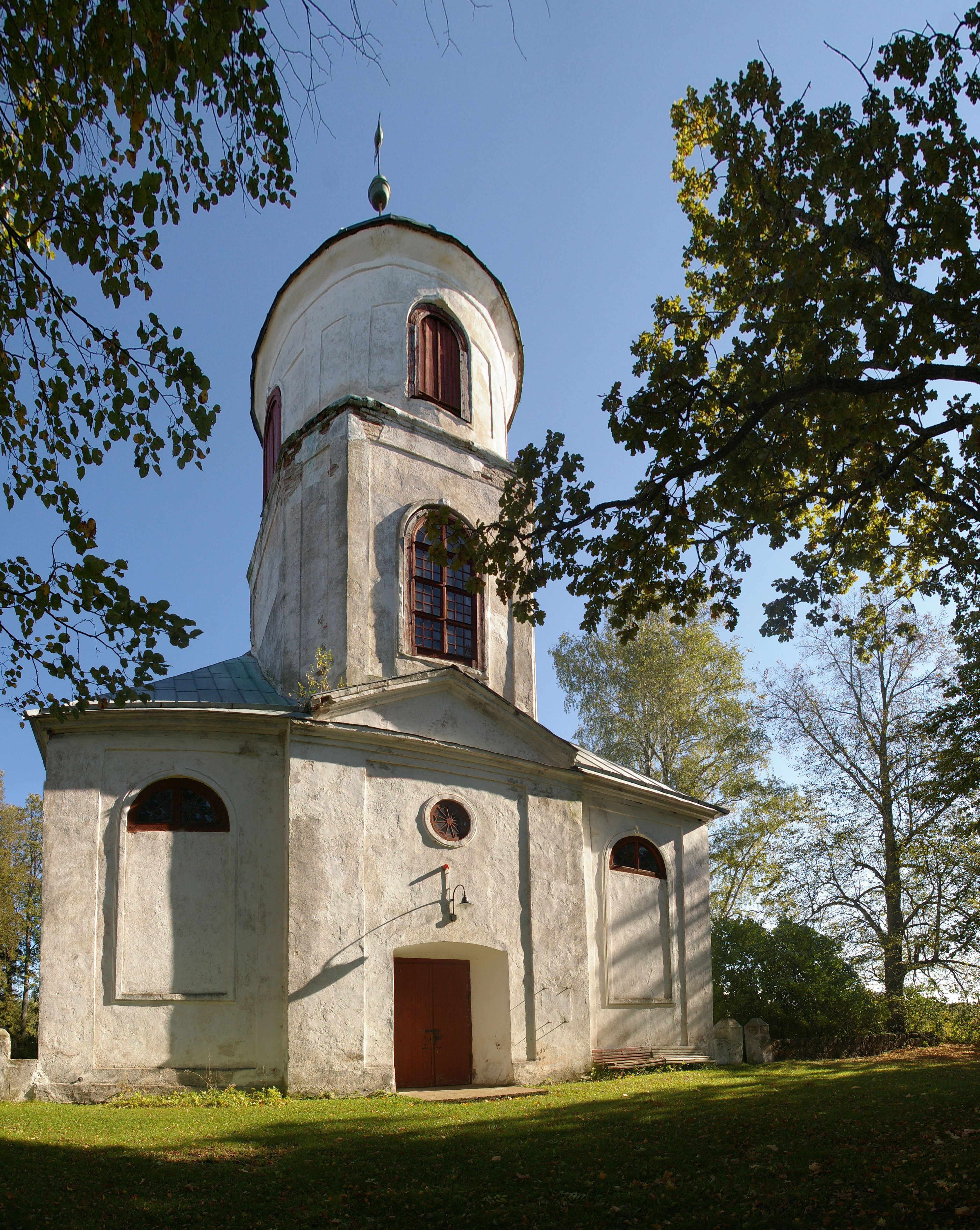 Kodavere Mihkli kirik. Varaklassitsistlik ühelööviline kivikirik